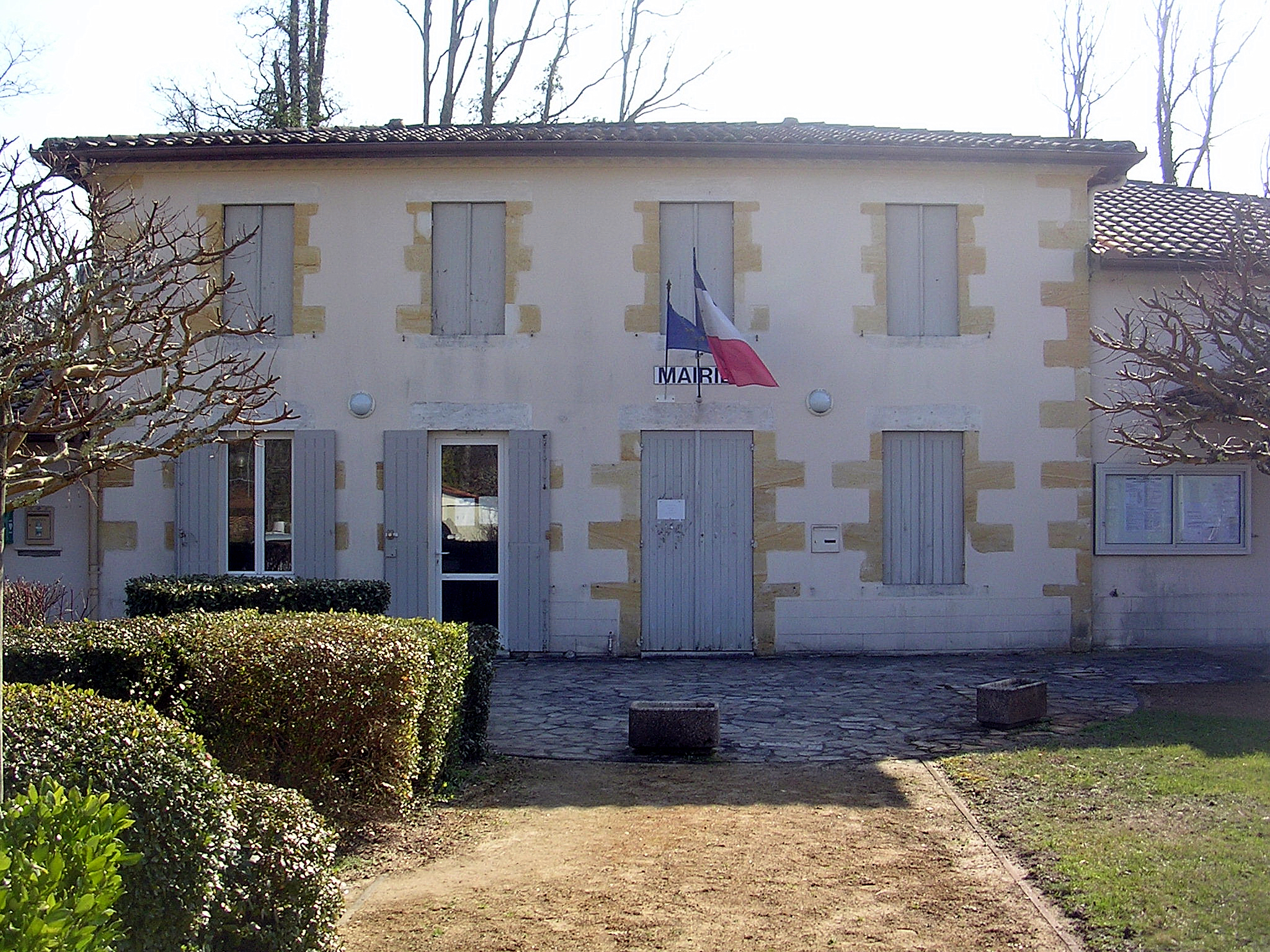 Mairie de Mano, dans le département français des Landes